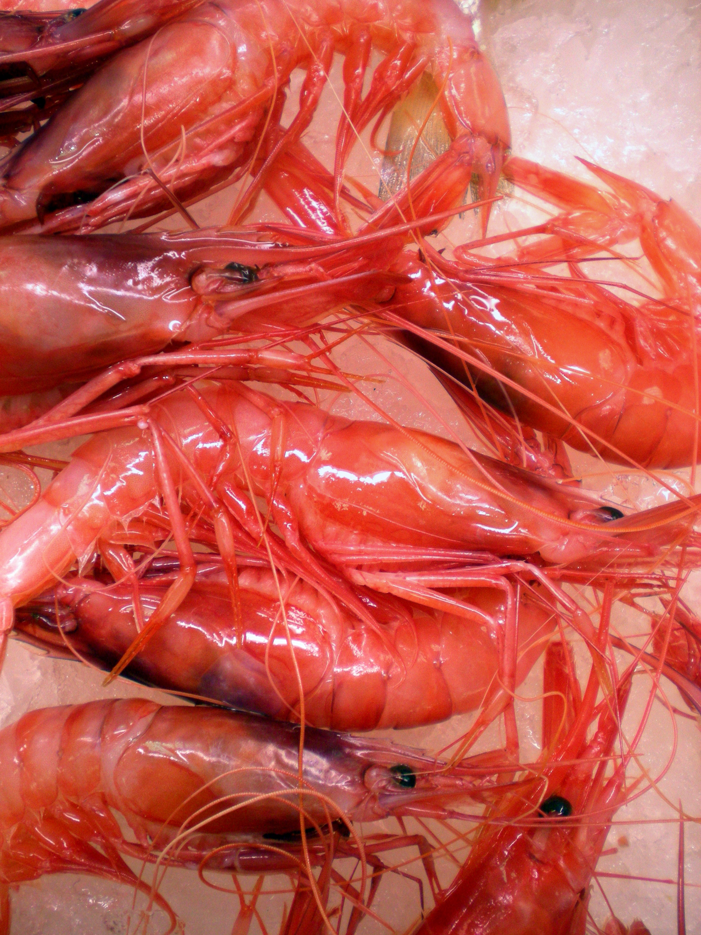 Gamba de Borriana. Aristeus Antennatus.